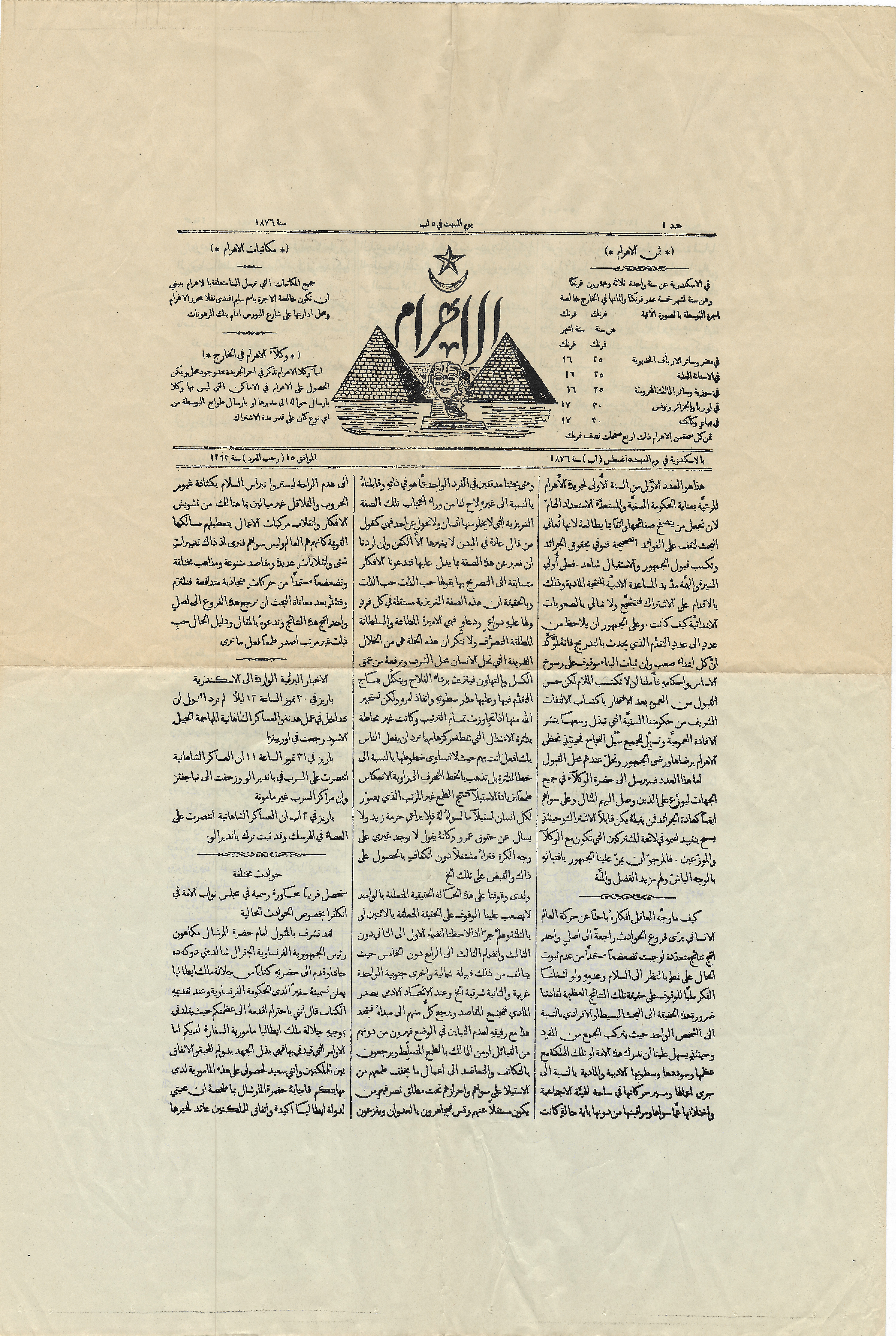 The first page of the first issue of the Egyptian newspaper "Al-Ahram" from August 1976.